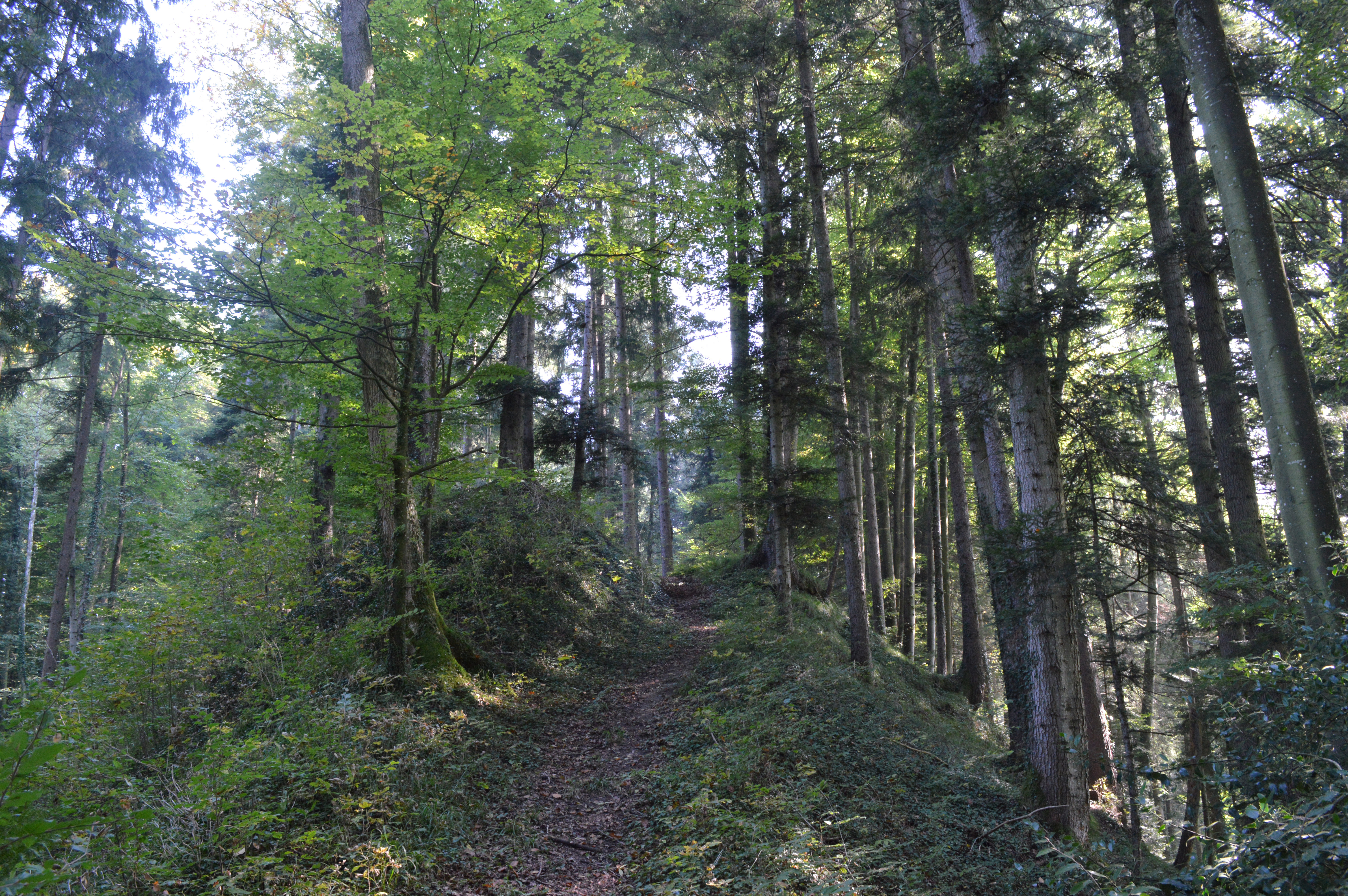 Dammartiger Aufstieg im Nordwesten der Waldburg in Häggenschwil